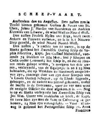 Berichte aus dem Bereich Schifffahrt der Tageszeitung "Leeeuwarder Courant" vom 29. August 1781 mit dem Beitrag zum Untergang des schwedischen Kriegsschiffes Princessan Sophia Albertina" vor Texel 1781